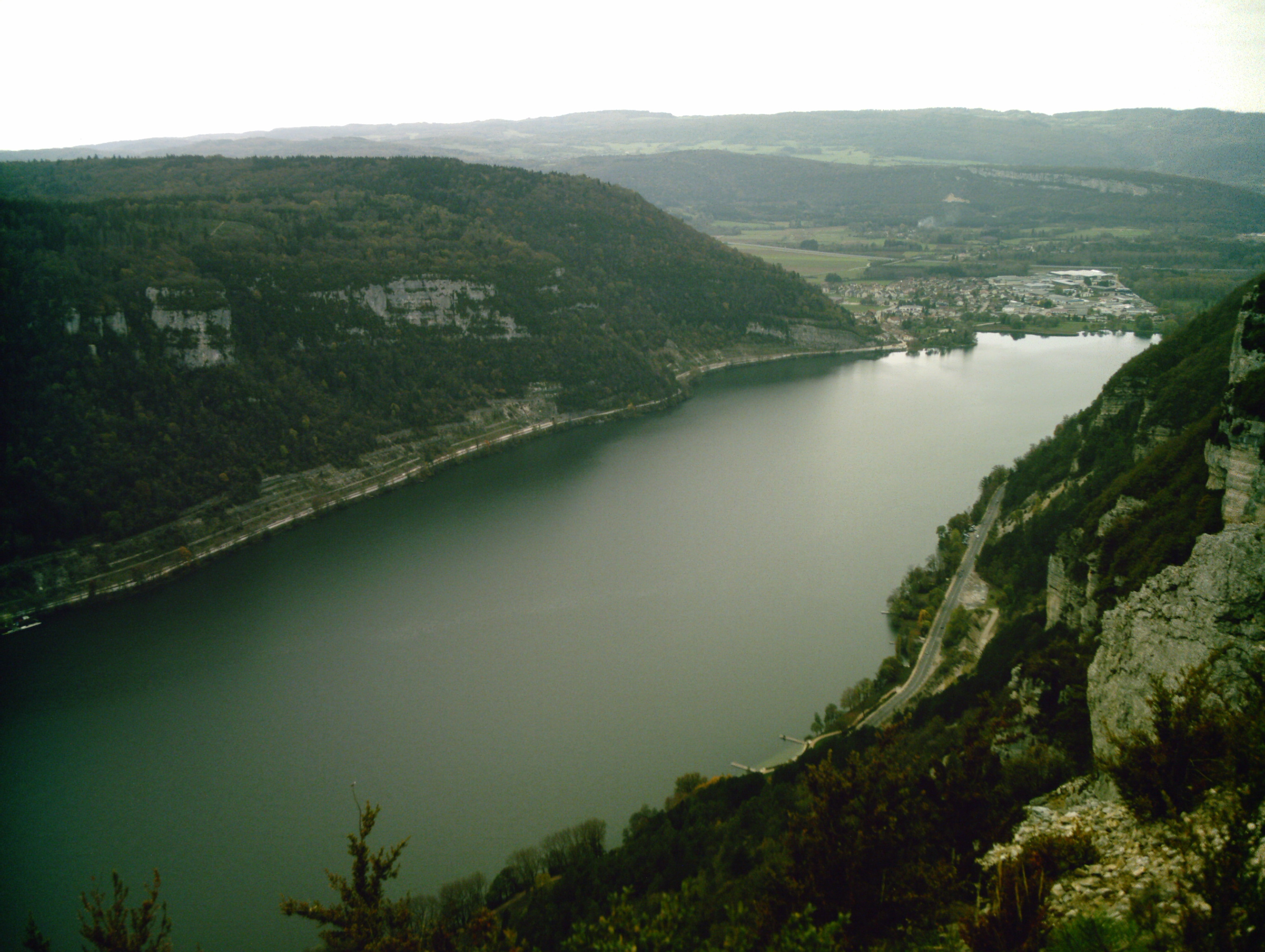 Le lac de Nantua (Ain, FRANCE) vue depuis le site de "la Colonne", à Nantua. Le village de Port est situé en arrière-plan.